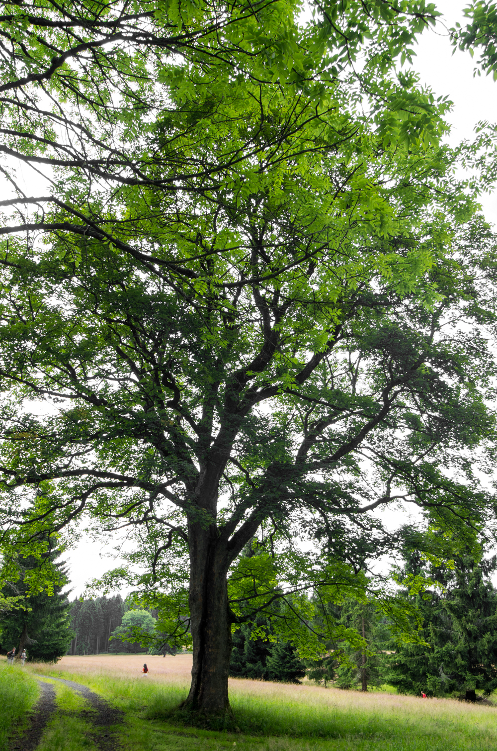 památný strom Javor na Hofberku, na odlesněné plošině pod Dvorským vrchem (Hofbergem 839 m), Nové Hamry, okres Karlovy Vary